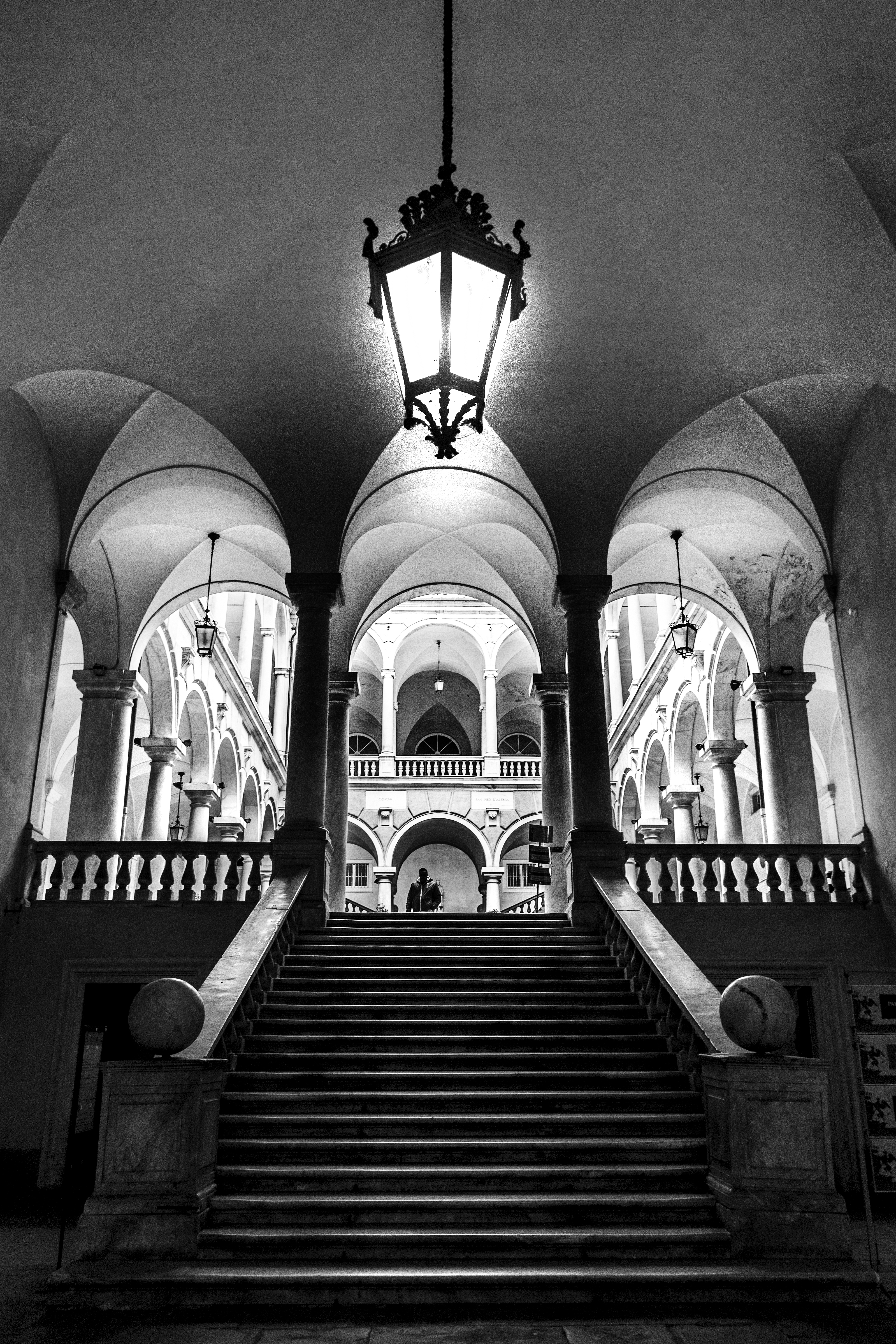 Palazzo Doria-Tursi - Musei di Strada Nuova This is a photo of a monument which is part of cultural heritage of Italy.